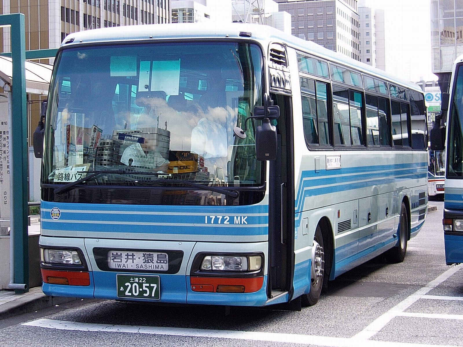 Kanto Railway 1772MK Isuzu KC-LV781R1 at Tokyo Sta.